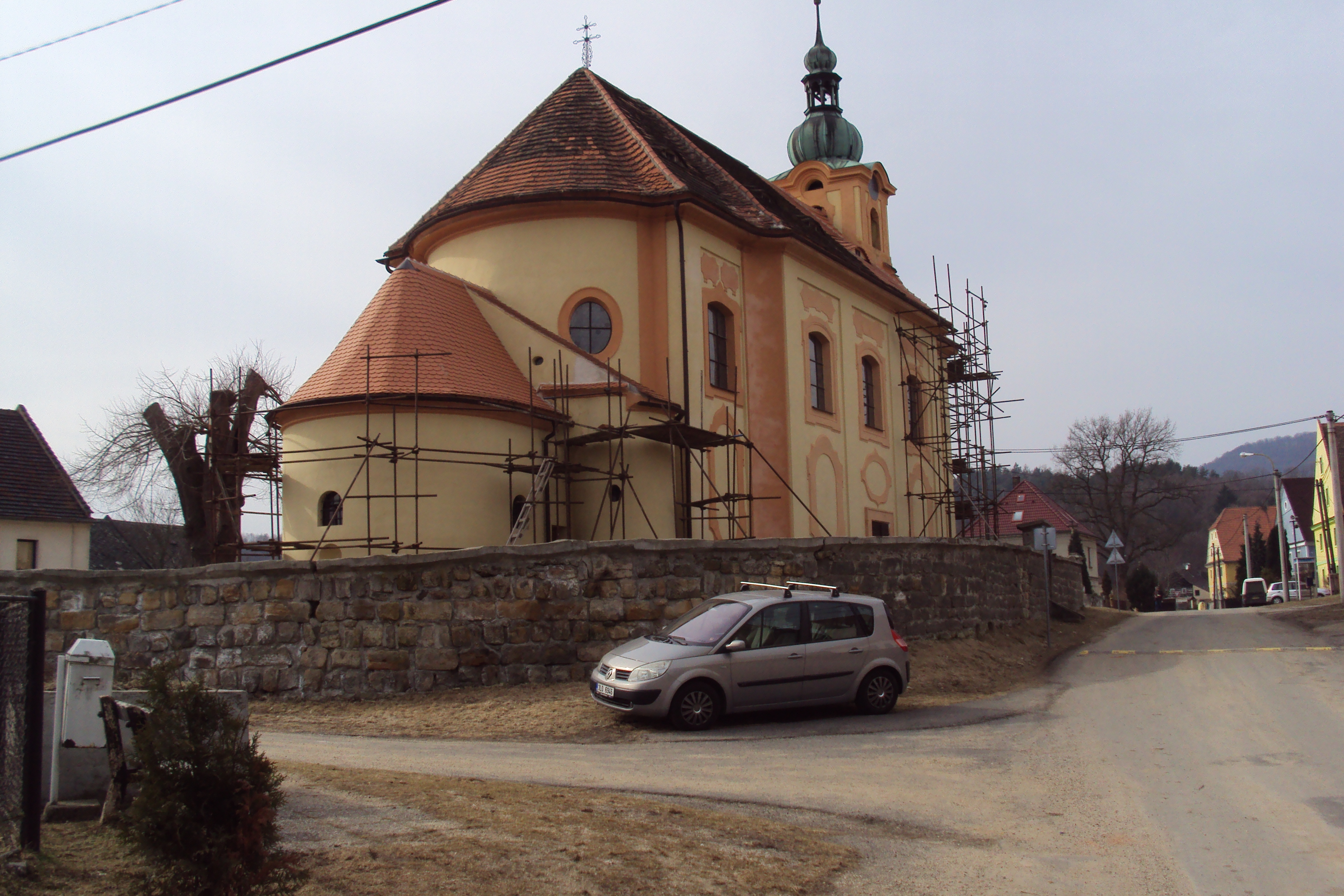 Kostel sv.Jakuba Staršího v obci Kvítkov na Českolipsku